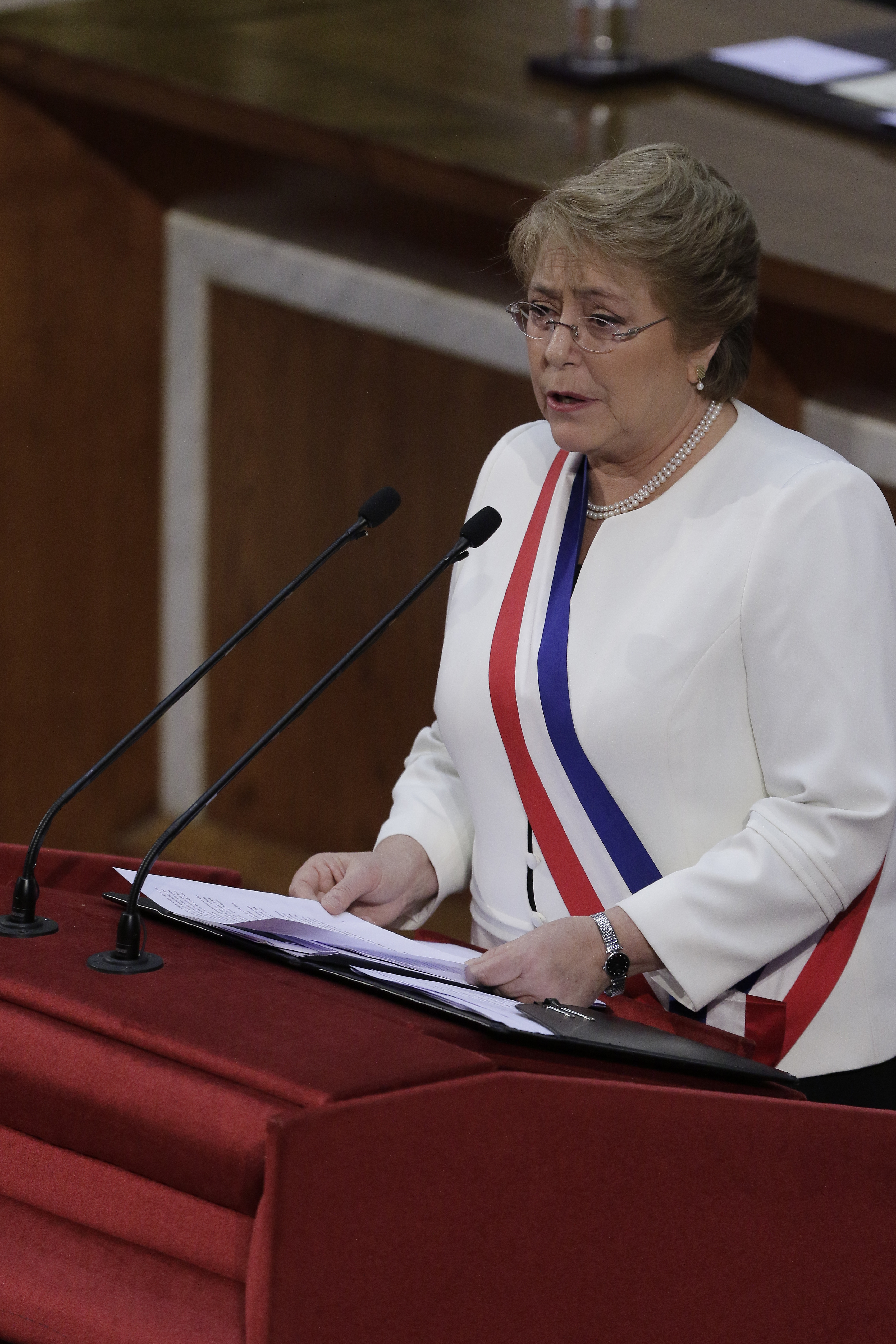 21/05/15 Ministro Marcelo Diaz asiste a Cuenta Publica de la Prdta. Michelle Bachelet en el Congreso Nacional.